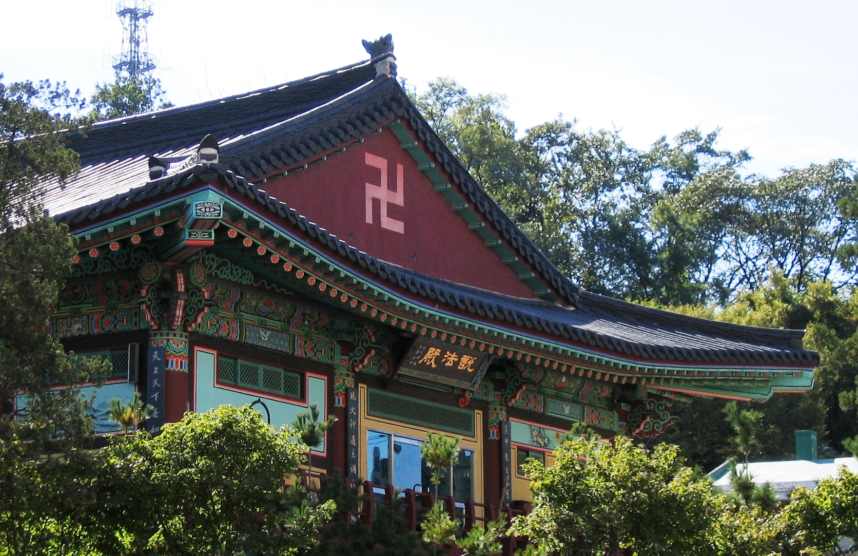 Swastika on building in Seoul